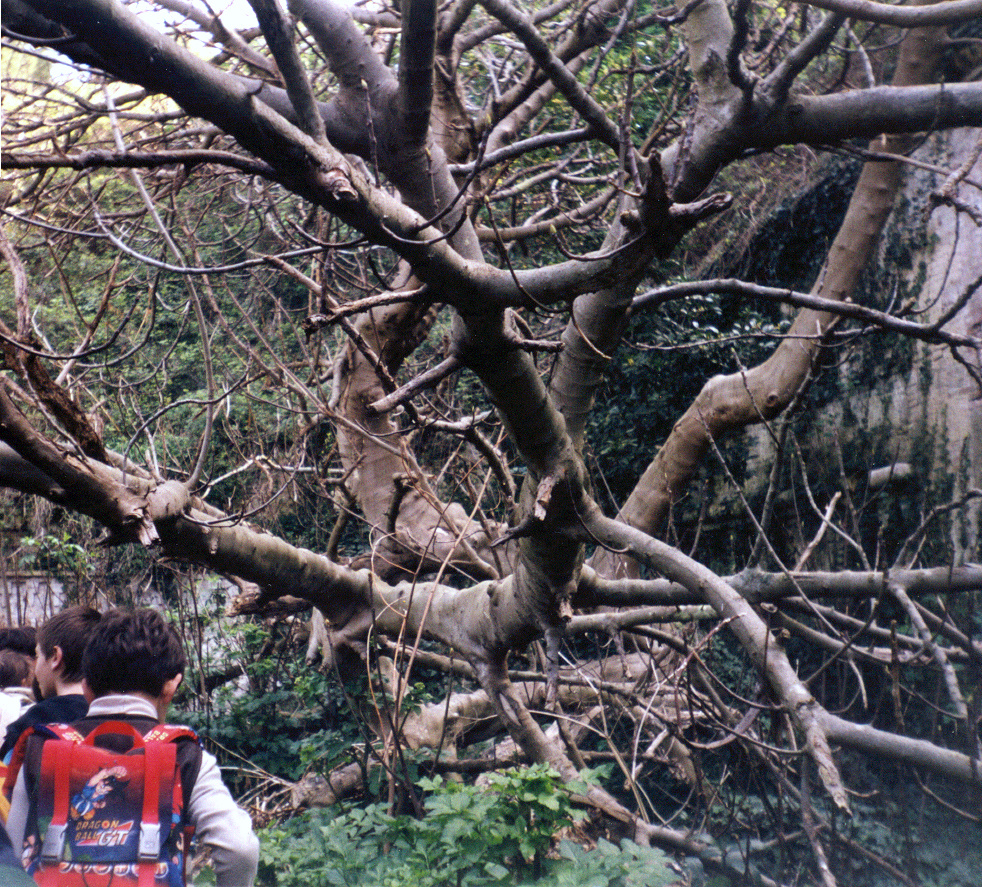 La foto, scattata nel 2000, rappresenta il maestoso albero di fico che sorge nei pressi della Polveriera Castelfidardo, all'interno del Parco del Cardeto di Ancona. L'immagine testimonia l'aspetto dell'albero prima dei lavori di ristrutturazione della polveriera, durante i quali esso è stato pesantemente danneggiato, nonostante il progetto fosse stato rispettoso della presenza dell'albero.